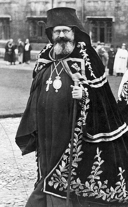 экзарх Стефан (Шоков)